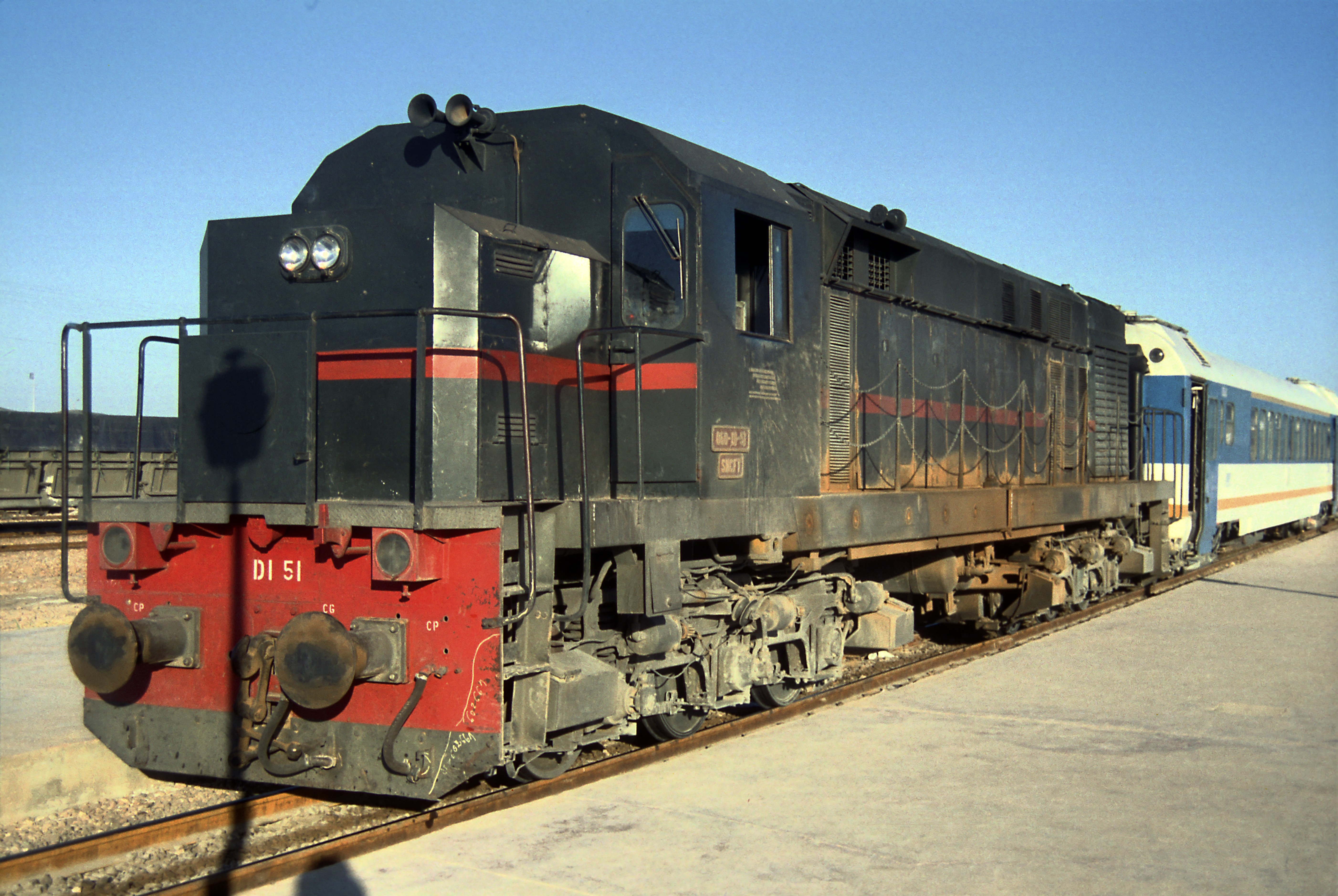 Umspurbare Lokomotive für Meter- und Regelspur, die Pufferbohrungen für den Regelspurbetrieb sind gut zu erkennen.